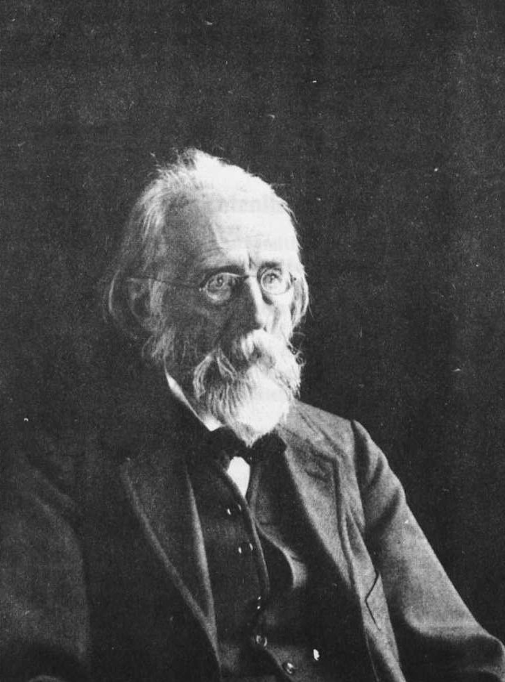 Theodor Nöldeke (1836–1930), deutscher Orientalist